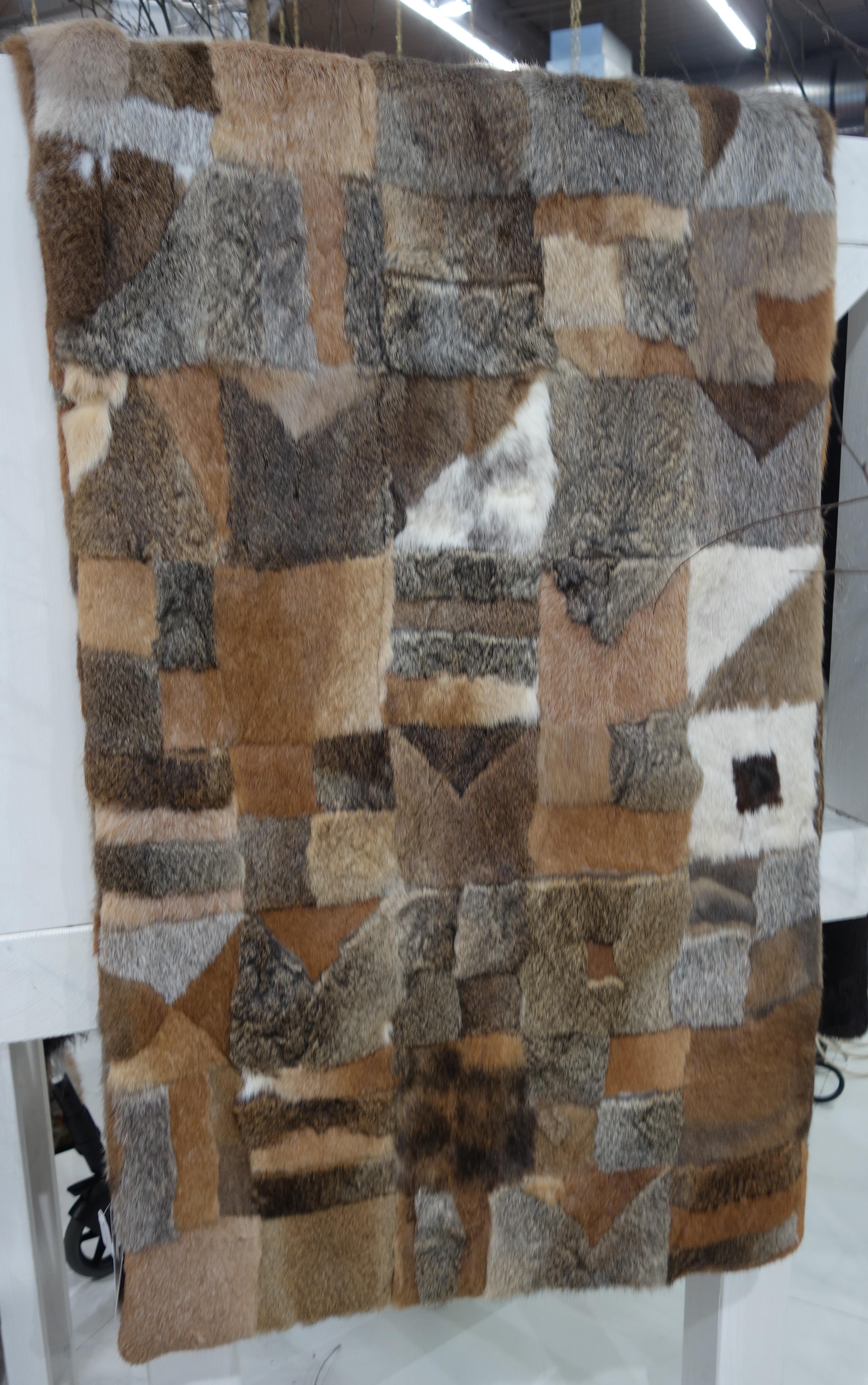 Jagd & Hund 2018, Dortmund Westfalenhallen. Kaninfelldecke. Gesehen bei Leonhard Hofstetter, Rötz.